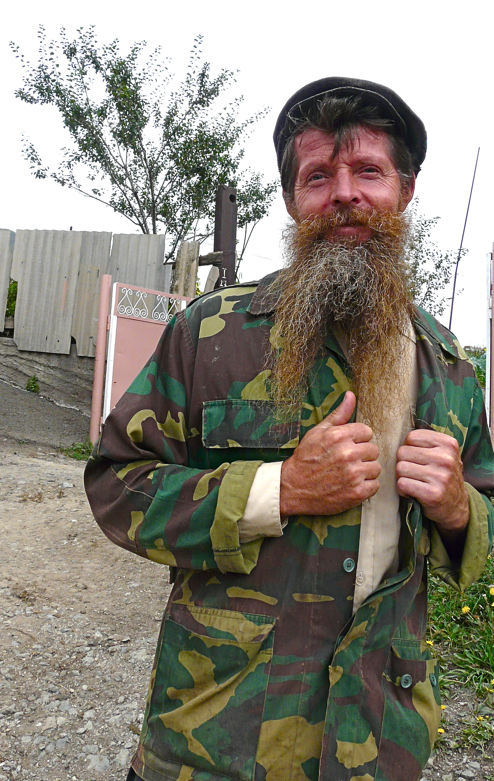 The man on this photo is not Armenian, he is old Russian (Molokan). Heel opvallend bij de mannen! Vooral jonge mannen. Eens gehuwd, wordt de baard niet meer geschoren.... Sinds hoelang is deze man gehuwd? Bekijk de lengte van zijn baardje! Provincie Lori: Fioletovo. Dorpje uit de 19de eeuw, gesticht door Russische families. De inwoners behoren bij de sekte van de 'Molokanen'. Dit zijn orthodoxe christenen die alle materiêle voorstellingen van God verwerpen. Dus geen kruisen, heiligenbeelden of kerken. Hun naam is afgeleid uit het Russische 'moloko' melk. Tijdens de vastendagen verzetten ze zich tegen de door de clerus opgelegde leefwijze en eten dan alleen producten van dierlijke oorsprong zoals vlees en melk. The Molokans (Russian: Молока́не) are a religious sect, among Russian peasants (serfs), who broke away from the Russian Orthodox Church in the 1550s. Molokans denied the Czar's divine right to rule and rejected icons. They also reject the Trinity as outlined by the Nicene Creed, the Orthodox fasts, military service, the eating of unclean foods, and other practices, including water baptism. They claim to be the direct descendants of the ancient Armenian "Paulicians", who became known as the "Bogomils" of Thrace, Bulgaria, Bosnia and Serbia. Molokan means "milk drinkers" in Russian, as they drank milk instead of fasting from it on Orthodox Fasts. uit